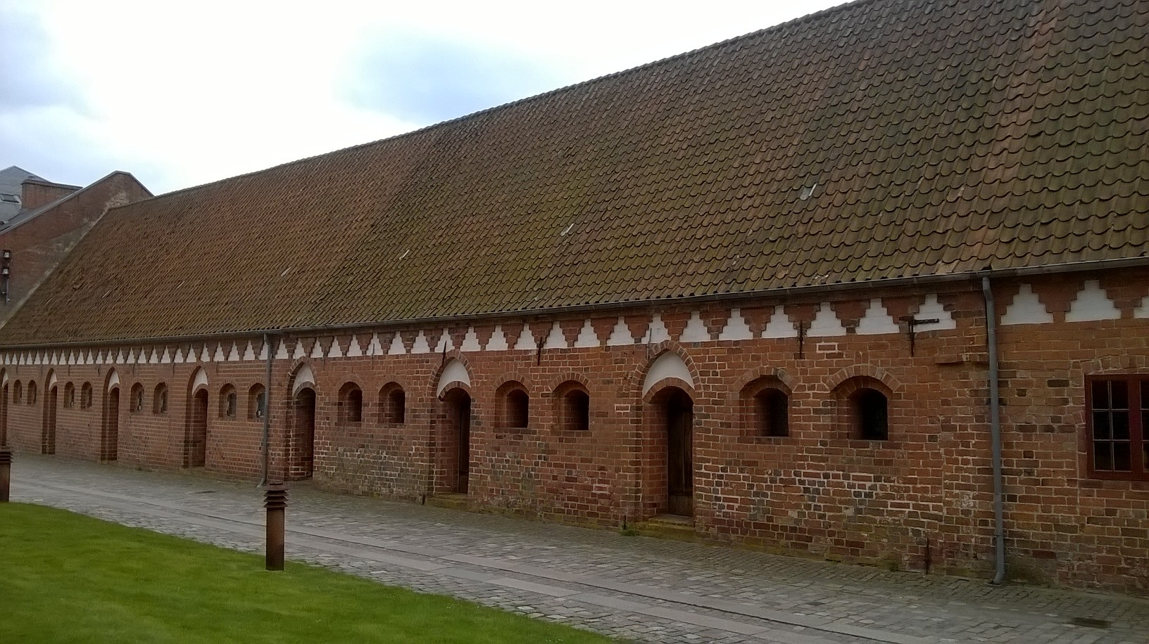 Den længste af boderne.